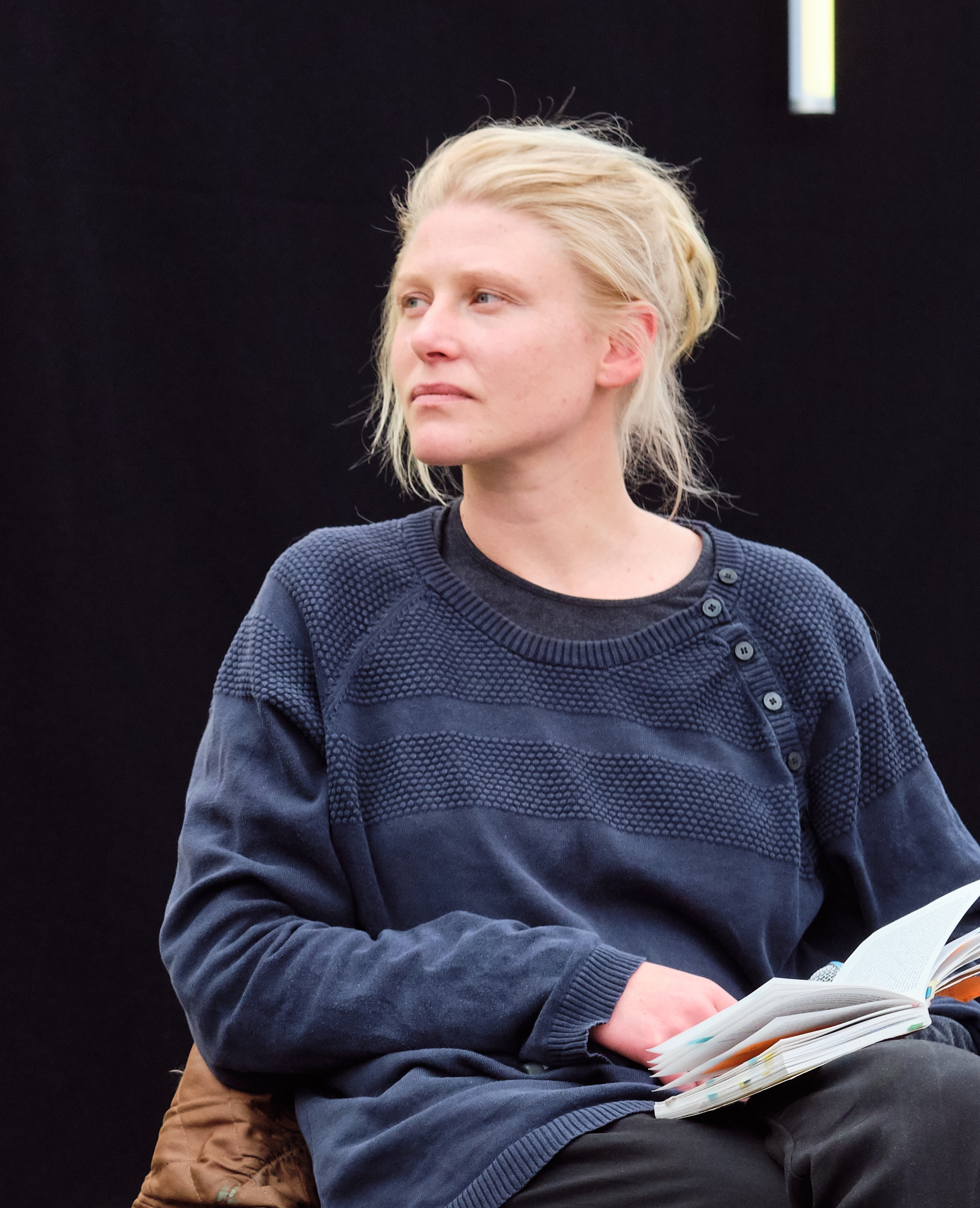 5. Mai 2019, Berlin: Netzfest19, Tag 2: Sina Kamala Kaufmann und Geraldine de Bastion